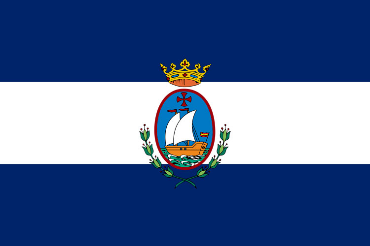 Bandera de la villa de San Juan del Puerto, Huelva, Andalucía, España